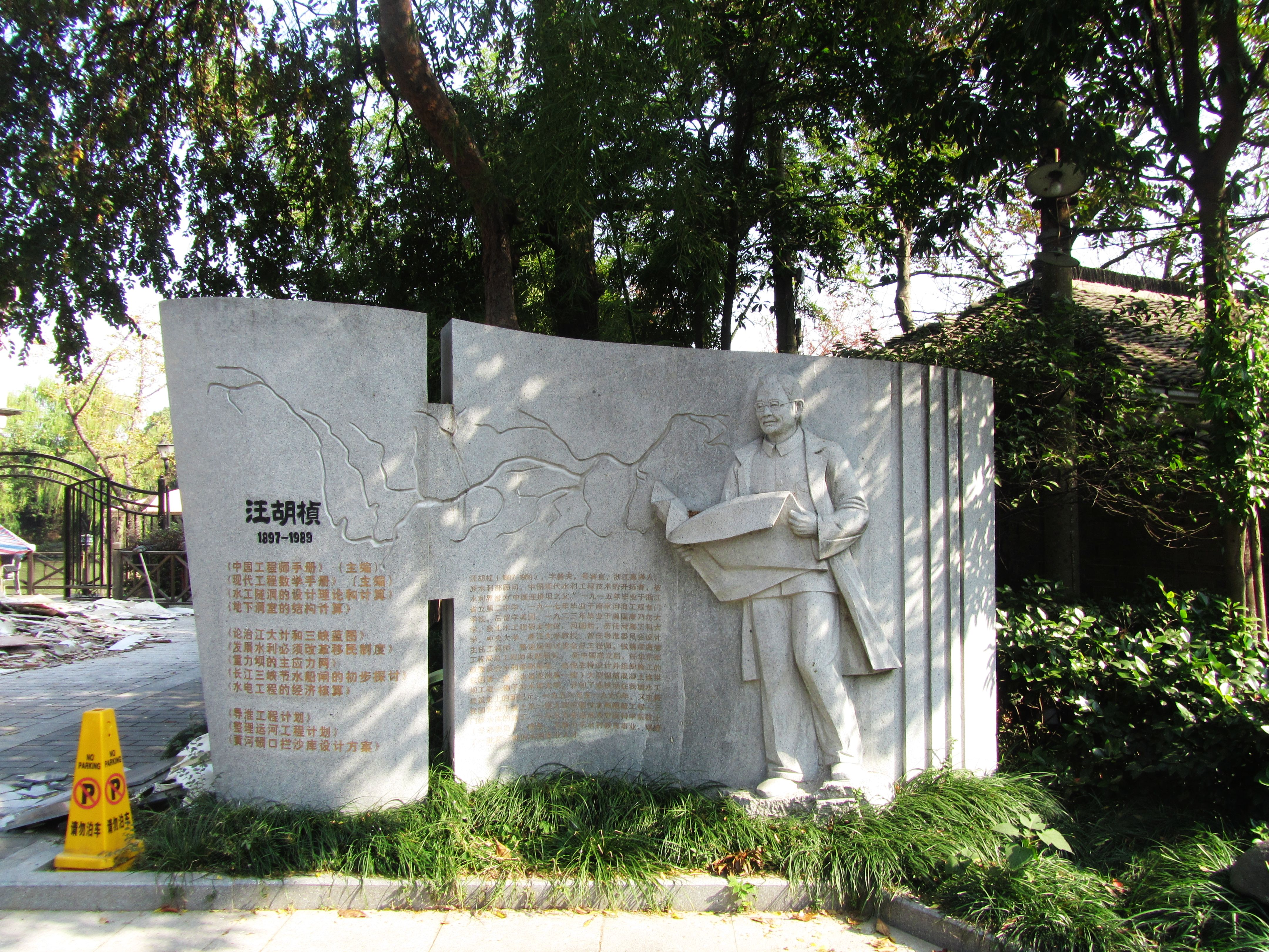 嘉兴梅湾街汪胡桢故居一侧的汪胡桢像。